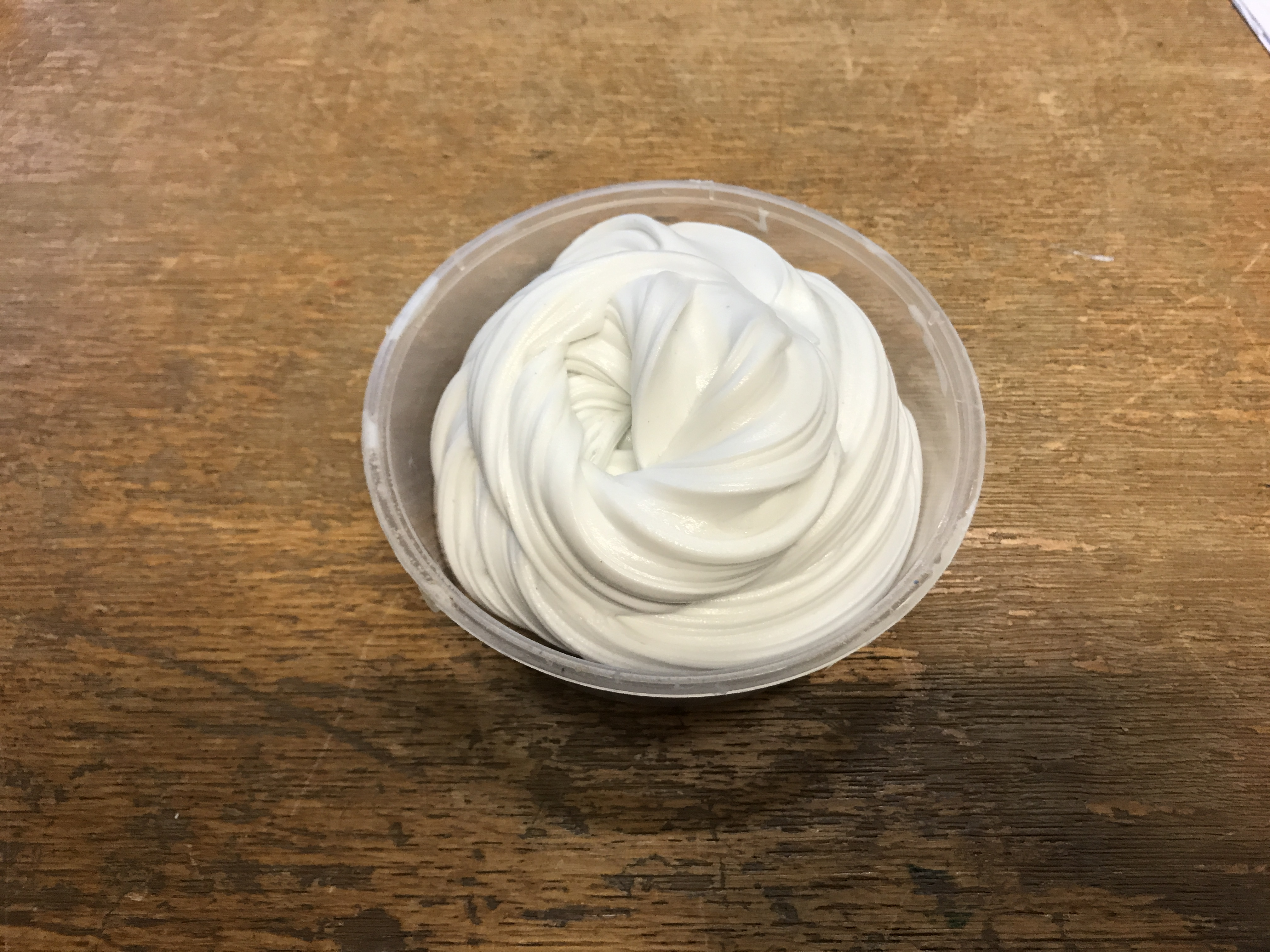 Sleim mewn pot.